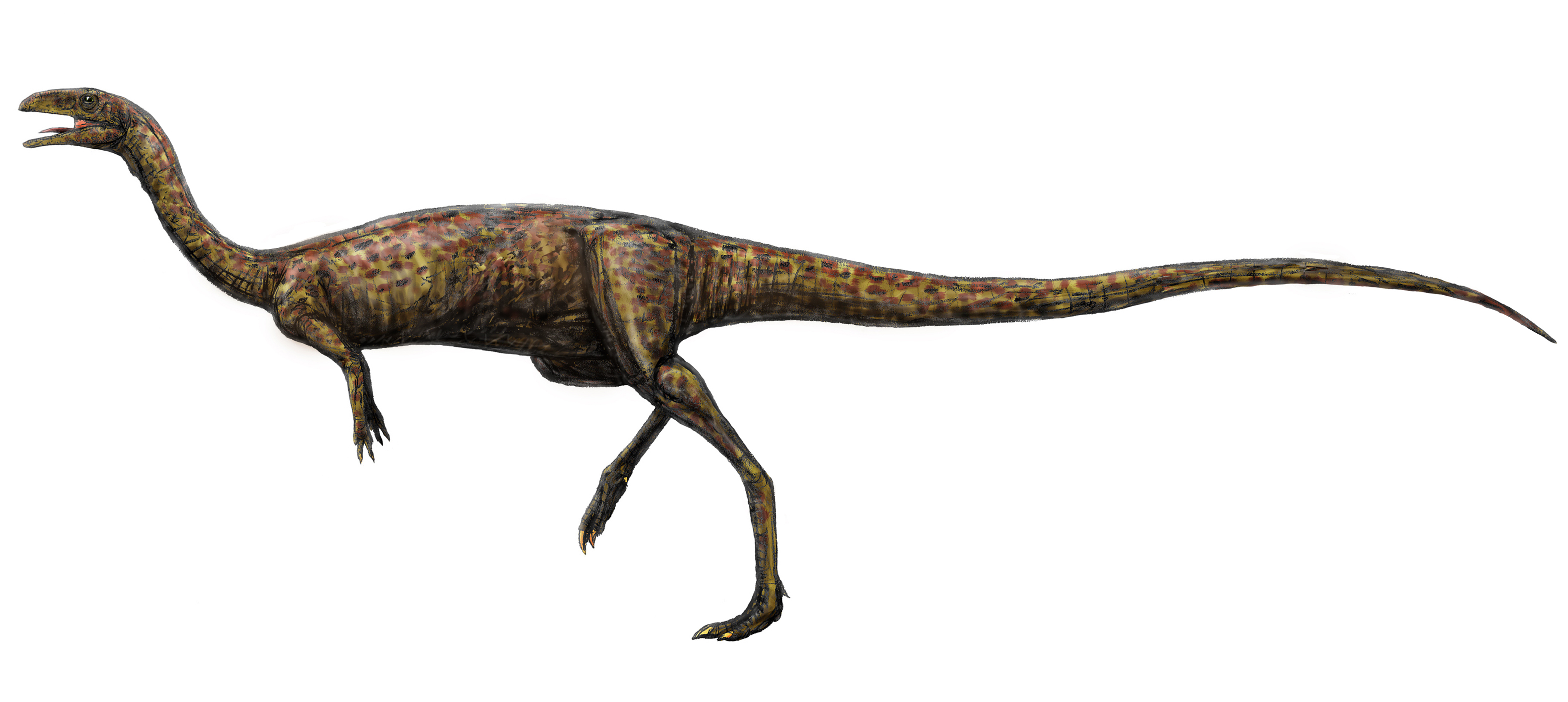 Elaphrosaurus bambergi. Head and hands based on Limusaurus.